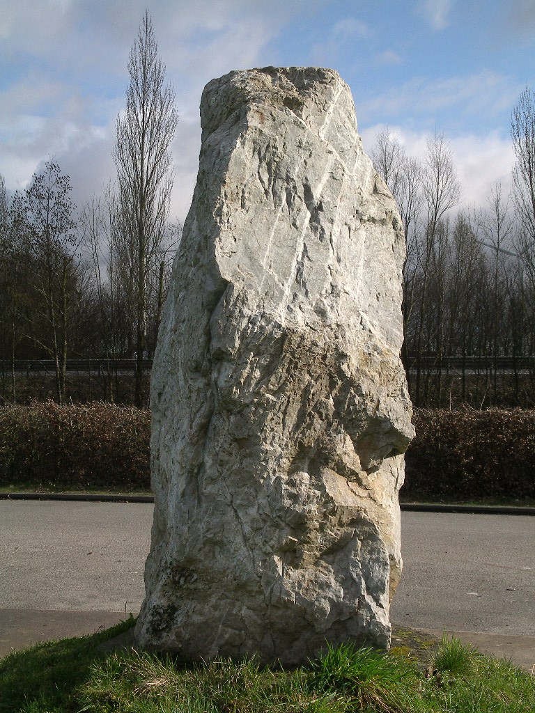 menhir sur la date de repos de la RN 158 de Soulangy Ouest